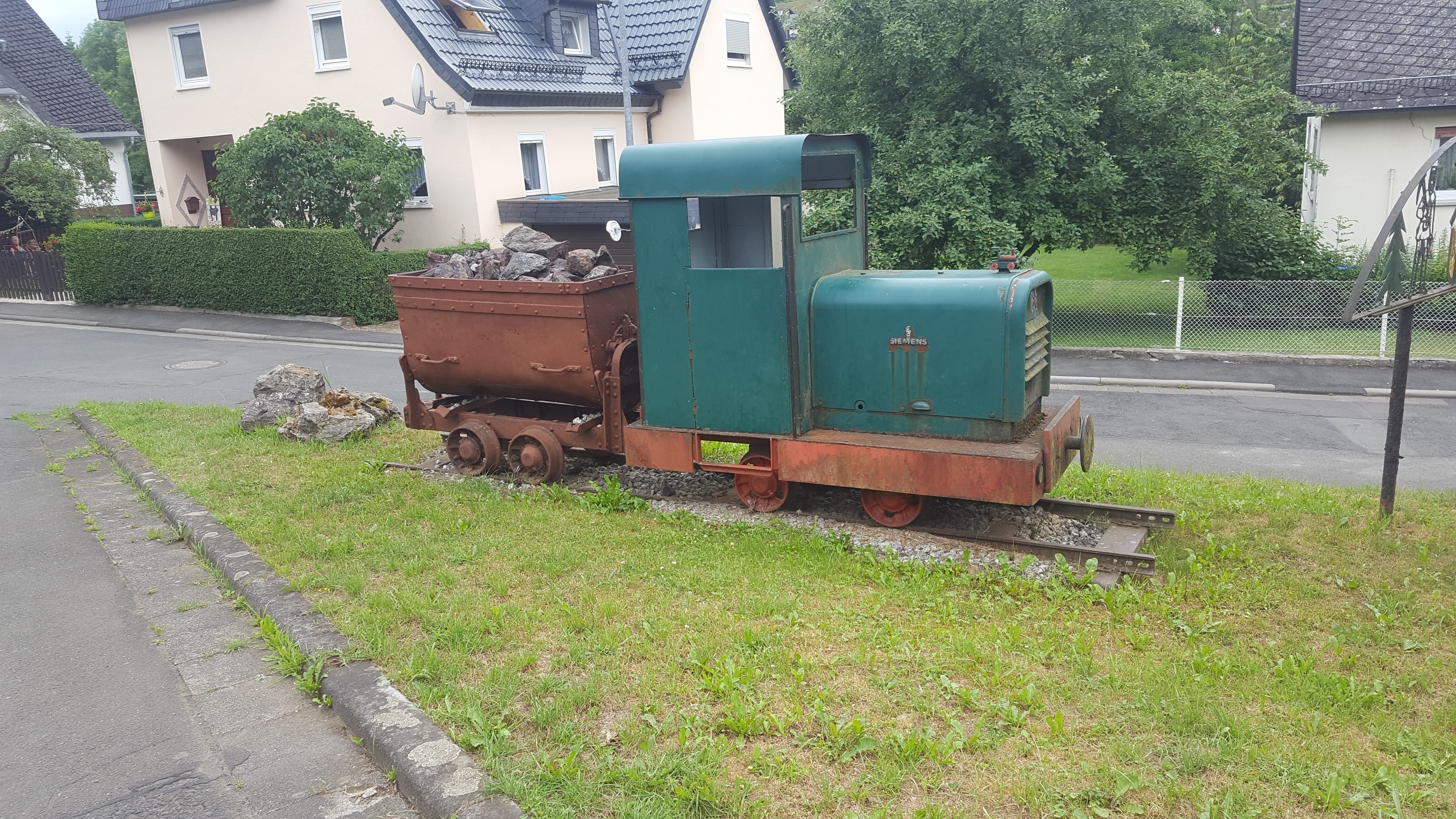 Grubenbahn der Grube Constanze bei Haiger-Langenaubach/Hessen